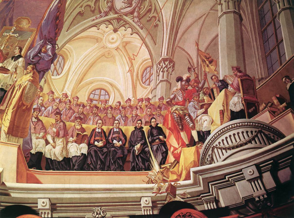 (detail)